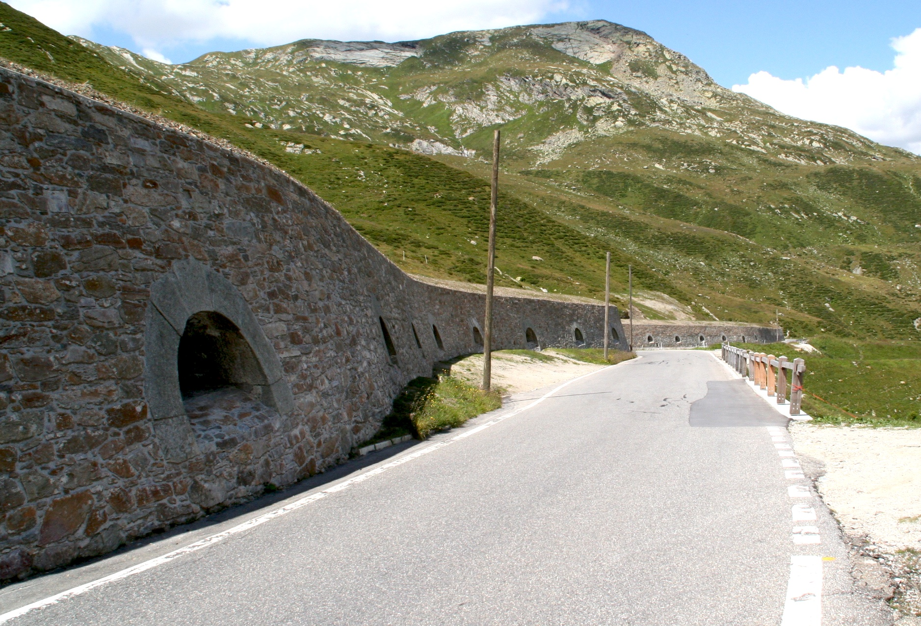 Splügengalerie talwärts